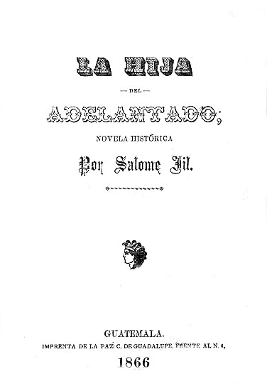 Portada de "La hija del Adelantado", de José Milla, de la edición original de 1866.